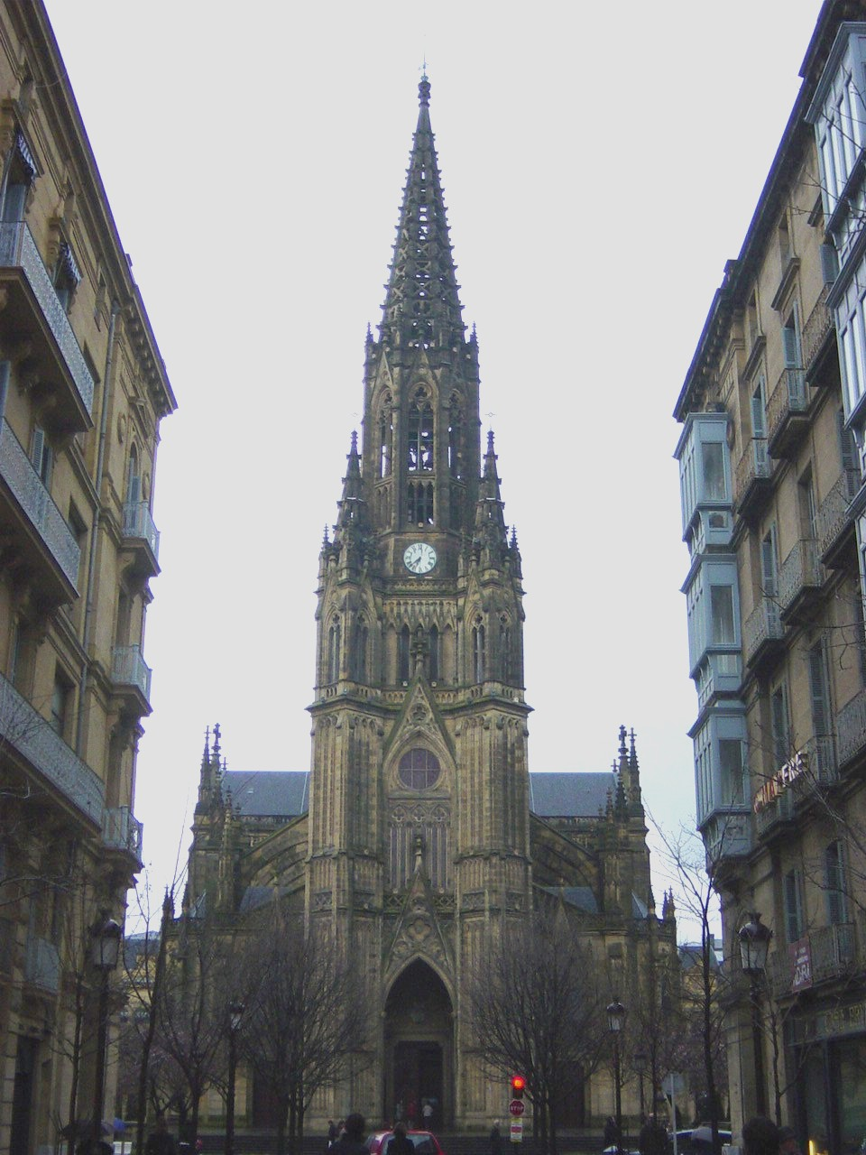 Catedral del Buen Pastor, San Sebastián (España)